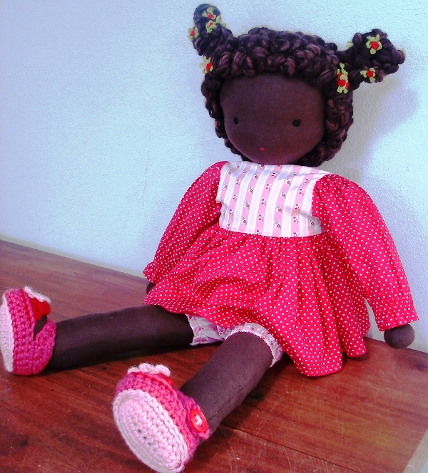 Waldorf dols by Nina Veiga